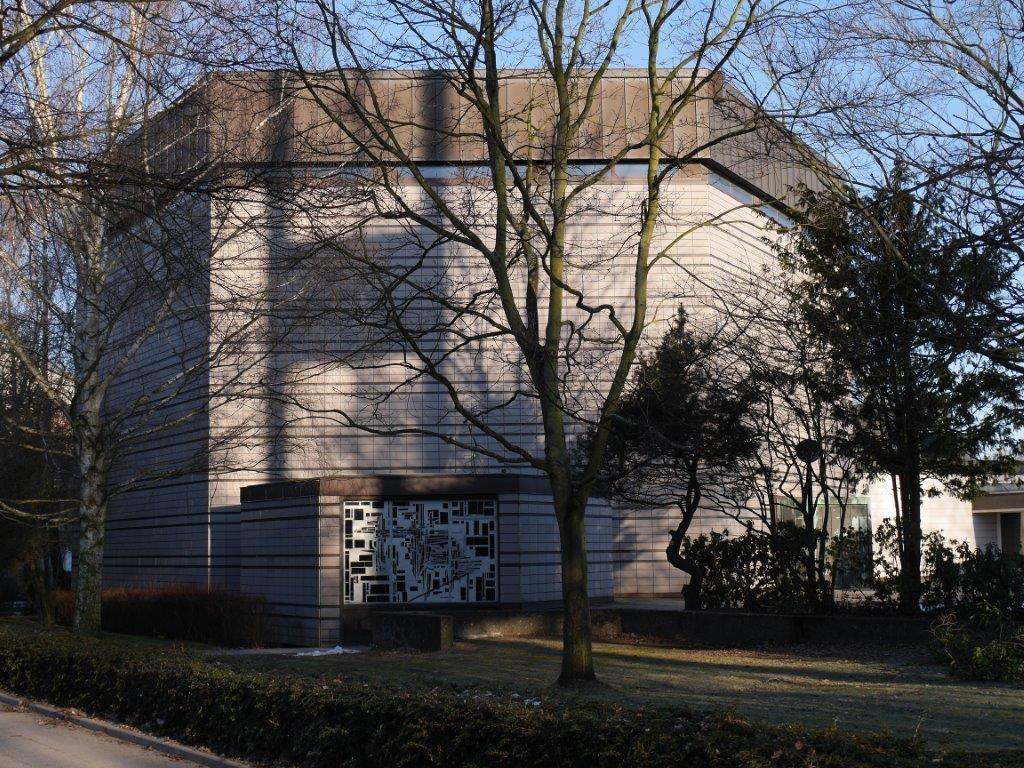 EV.-LUTH. ANSGARKIRCHE Die Kirche mit Turm, Gemeindehaus, zwei Pastoraten und Wohnungen wurde nach Plänen von Otto Andersen 1963-66 erbaut. Geschlossen hochgezogene Wände bilden einen sechseckigen Raumkörper. Ein oben umlaufendes Lichtband und ein Oberlicht über dem Altarplatz erhellen das Innere. Der zentralisierende Innenraum konzentriert die Gmeinde. Kruzifix und Taufbecken fertigte die Bildhauerin Ursula Querner.